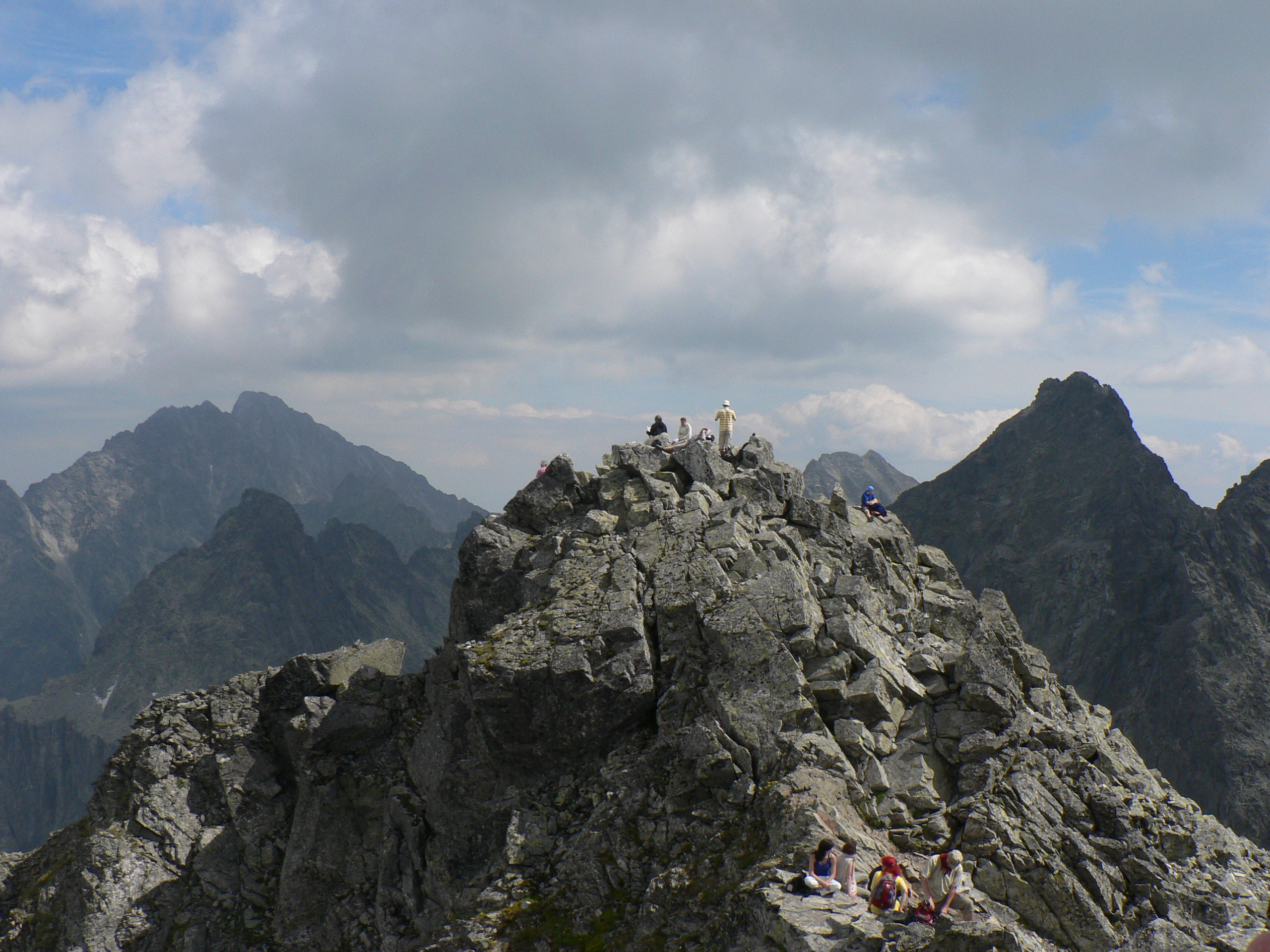 Słowacki wierzchołek Rysów z polskiego, Gerlach, Ganek, Wysoka